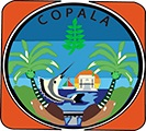 Logo del municipio de San Juan Copala, Guerrero